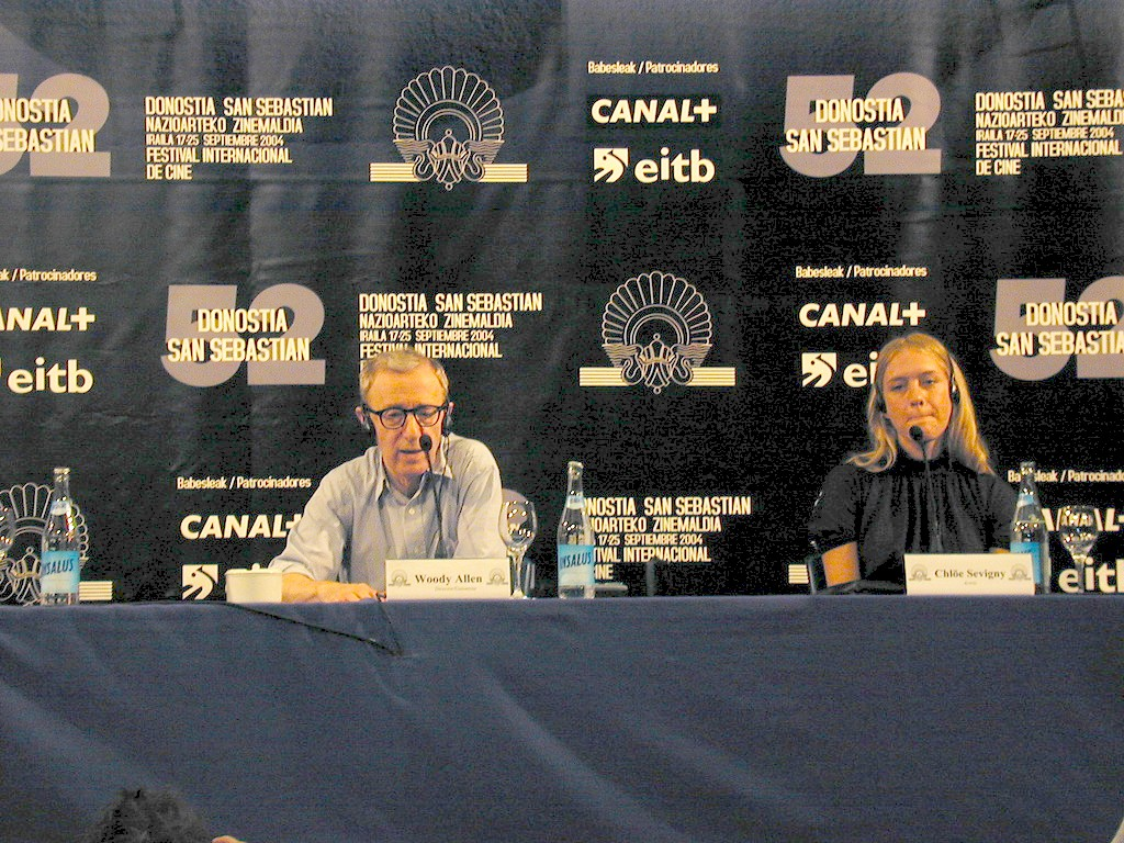 Woody Allen et Chloë Sevigny pour la promotion de Melinda et Melinda